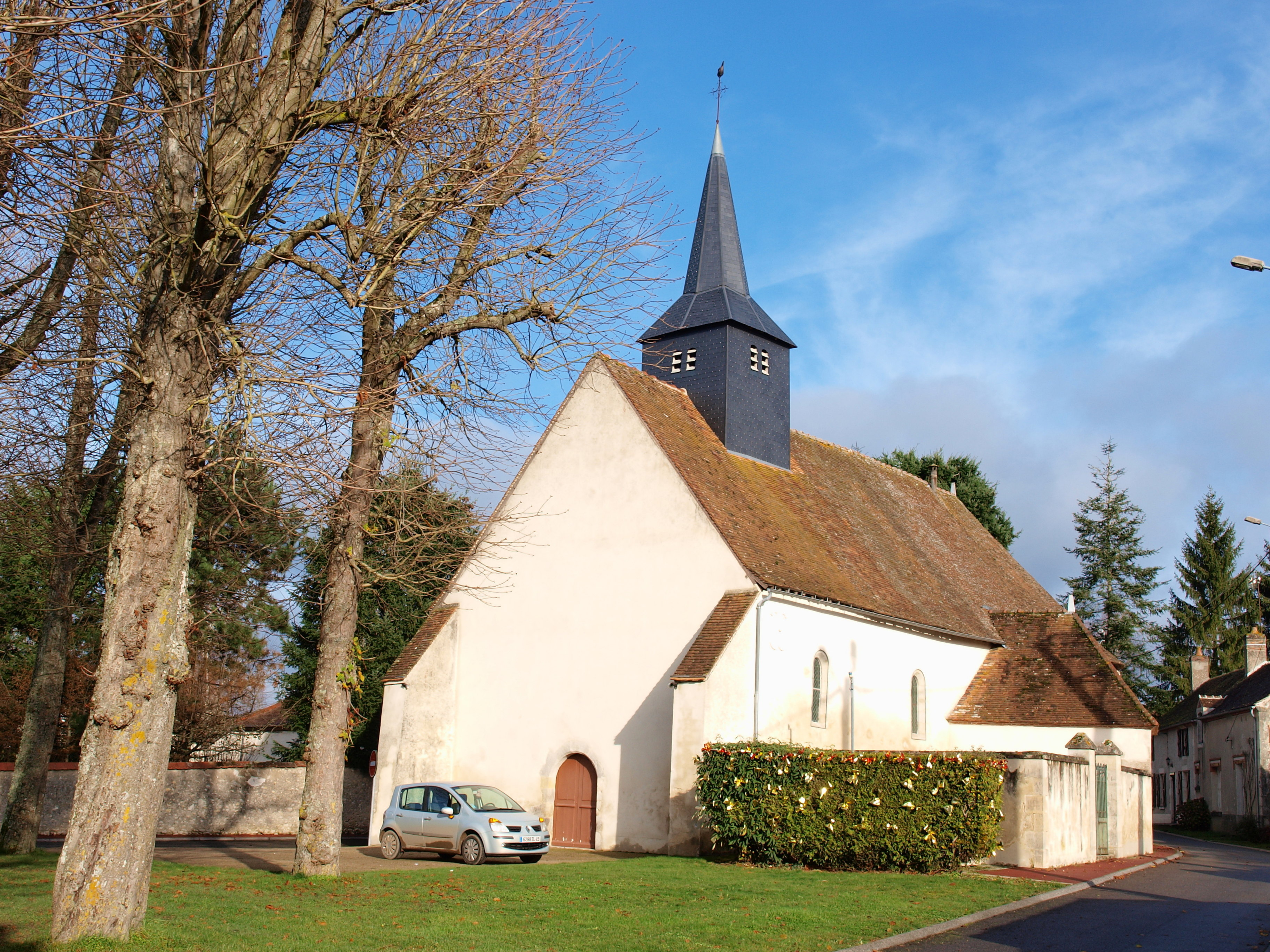 Thou (Loiret, France) ; l'église.